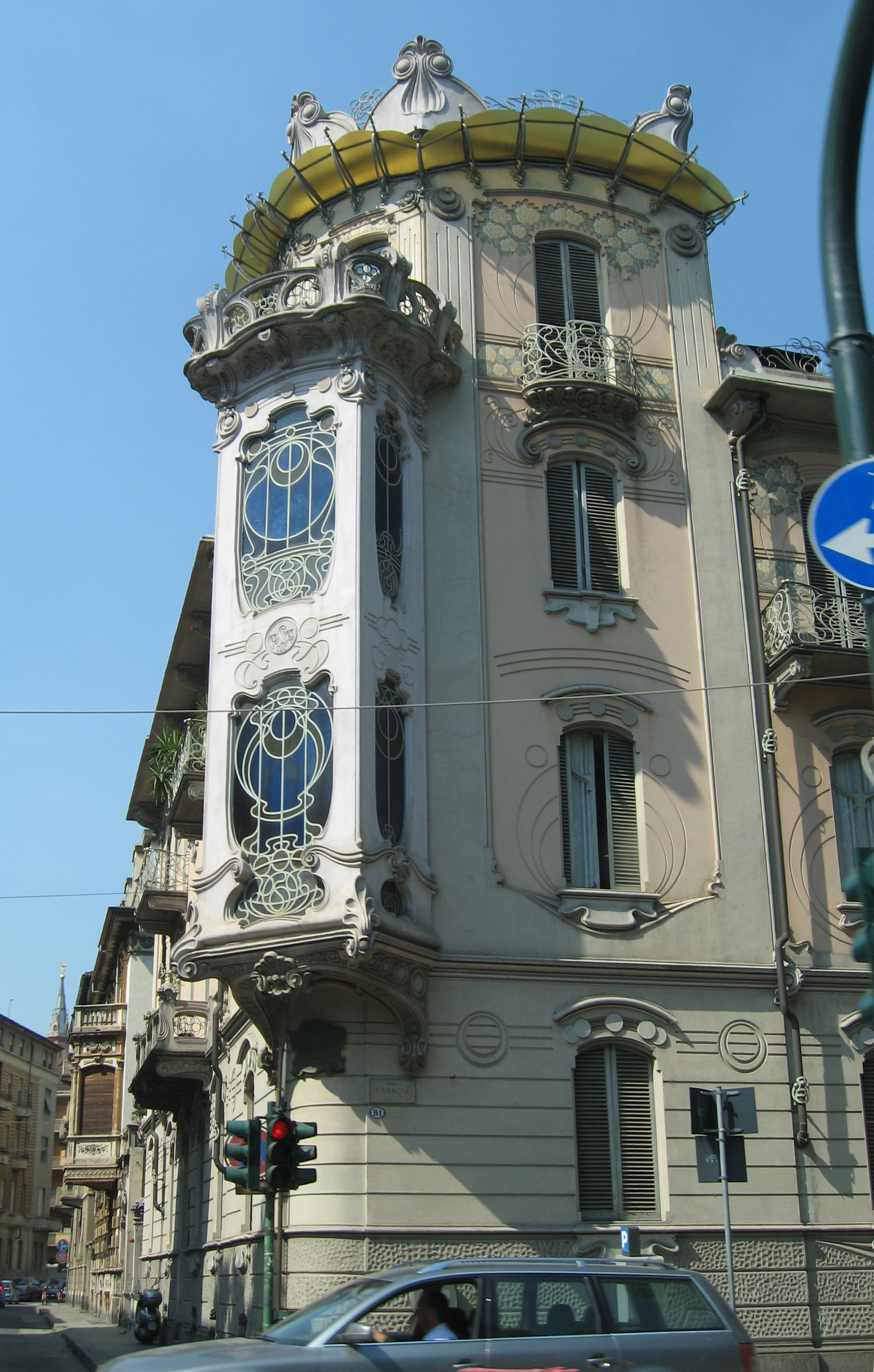 Casa Fenoglio-La Fleur. Il capolavoro di Fenoglio, ma anche uno dei migliori e piú caratteristici liberty di Torino. È situata nell'angolo tra corso Francia e via principi d'Acaja. È visibile la stupenda finestratura del bovindo, sovrastata dal balcone coperto. Tra le due vetrate colorate il pendaglio con la data in cifre romane: MCM III 1903, l'anno di costruzione.